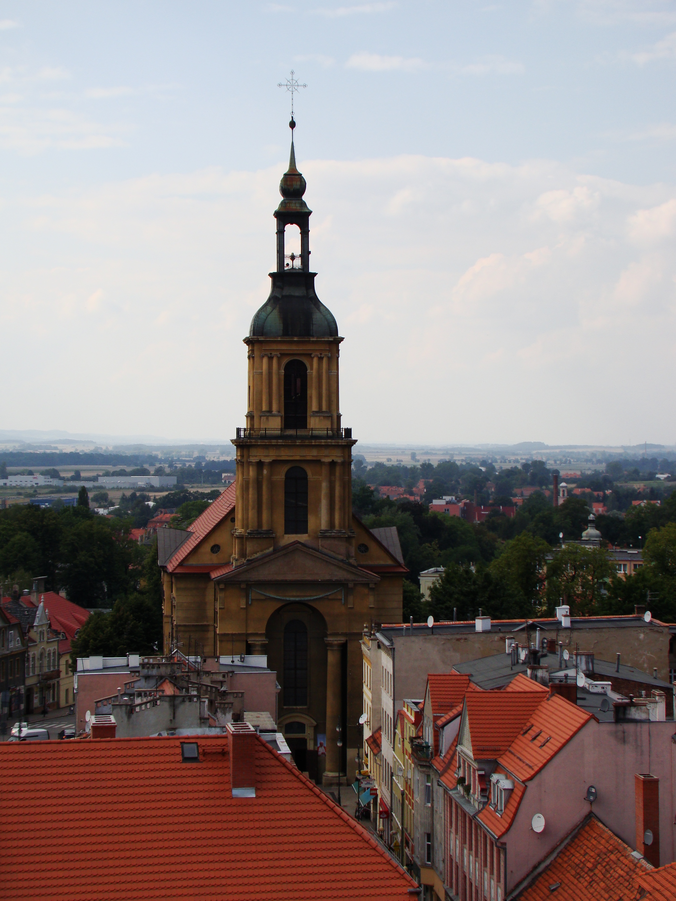 Dzierżoniów, zbór ewangelicki, ob. kościół rzym.-kat. par. p.w. Matki Boskiej Królowej Polski, 1795-1798